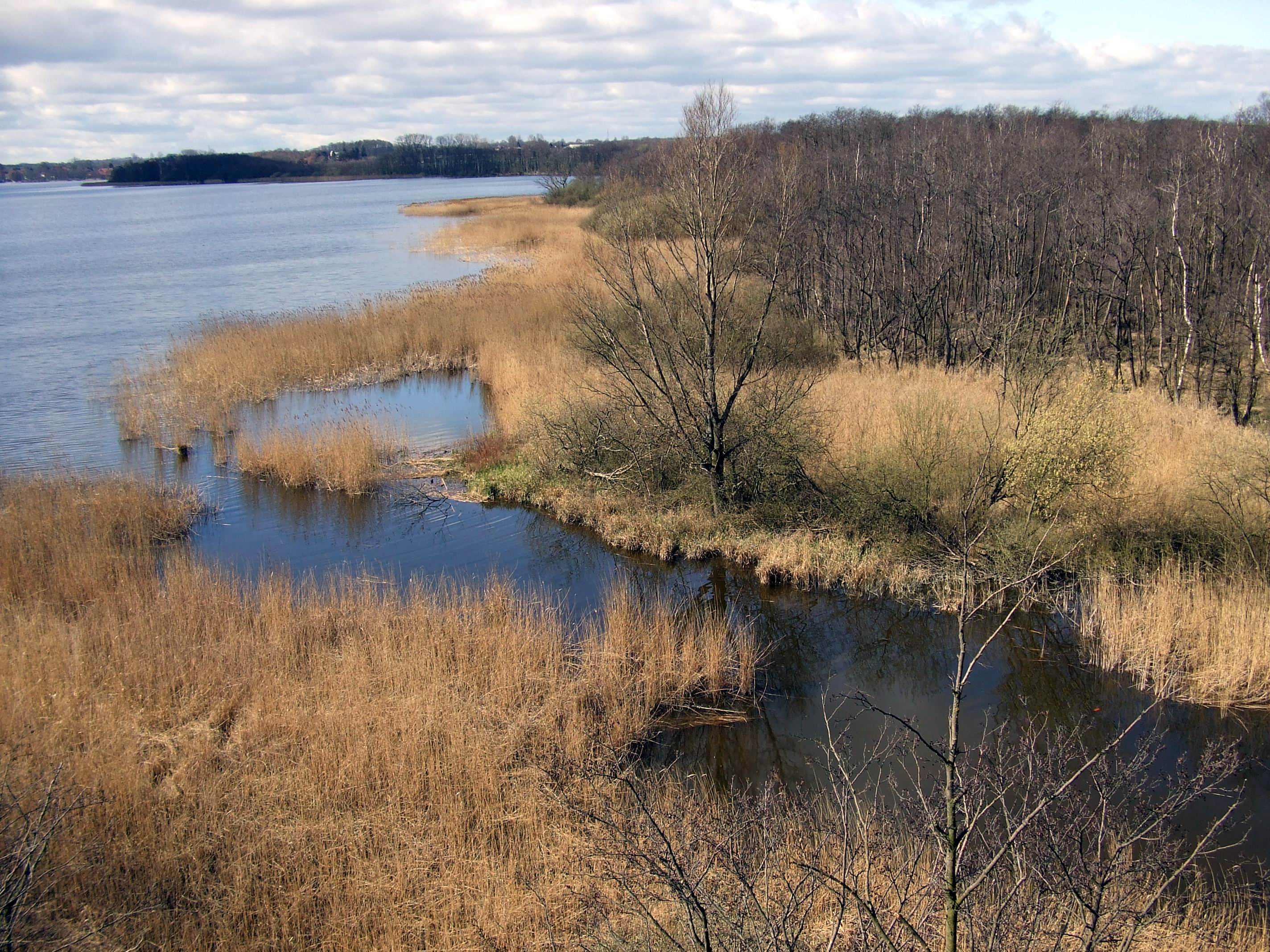 Nordufer des Hemmelsdorfer Sees mit Aalbek (Abfluss zur nahen Ostsee), Bereich im Naturschutzgebiet „Aalbeek-Niederung“.